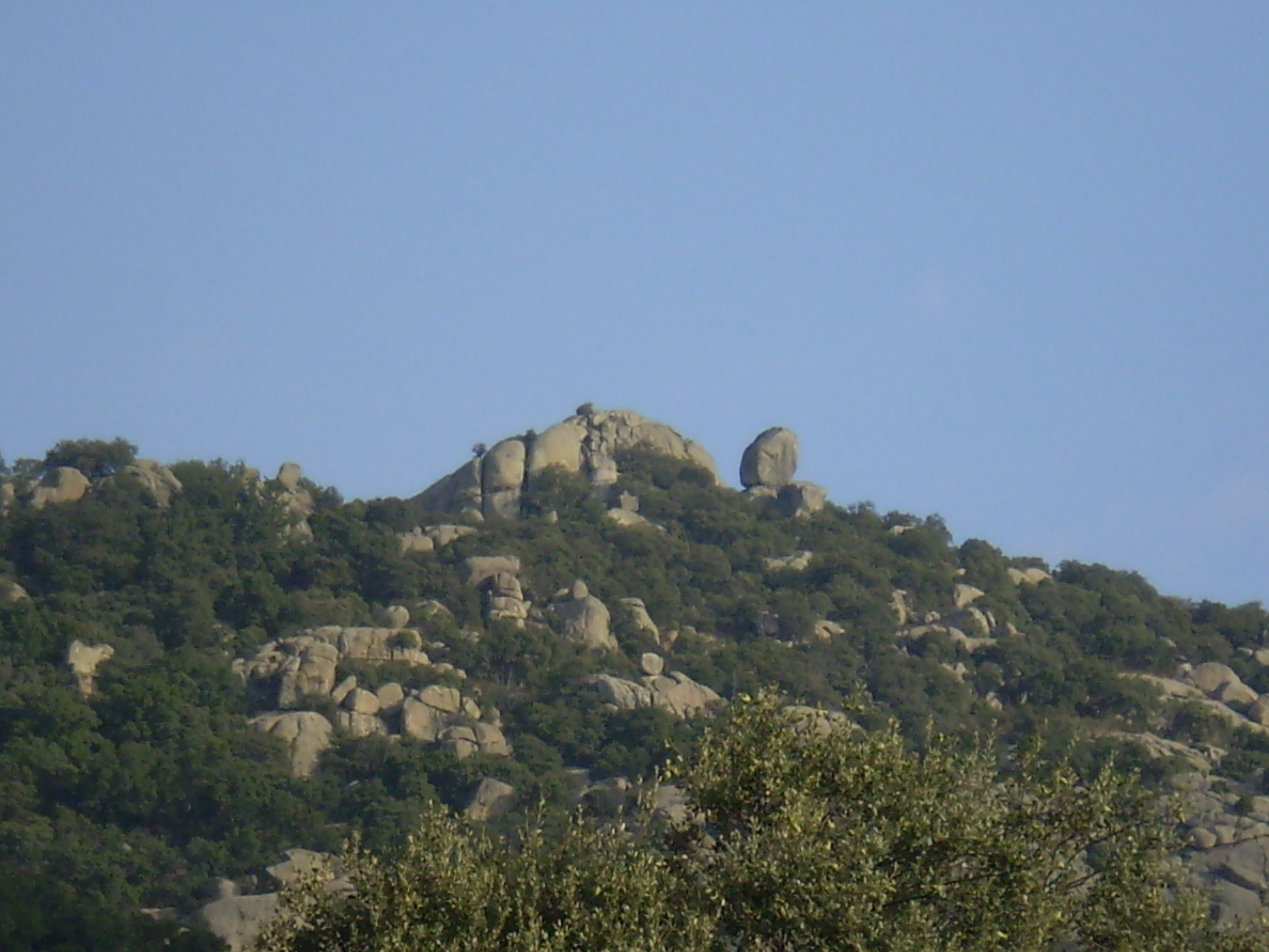 La Tortuga. Sierra del Hoyo (Sierra de Guadarrama, Community of Madrid, Spain)